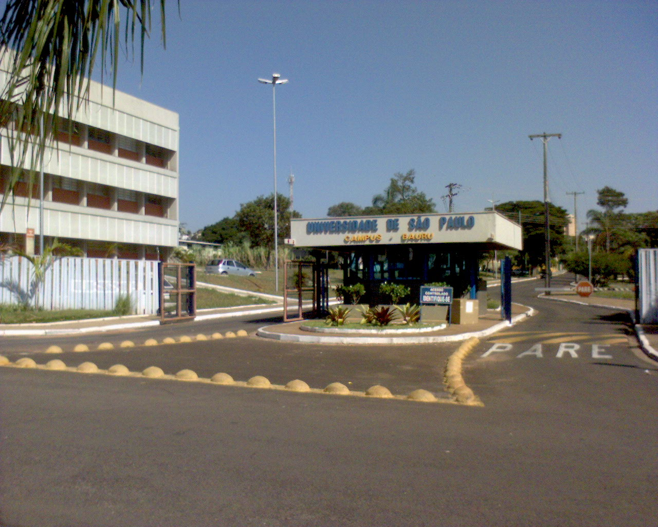 USP unidade de Bauru